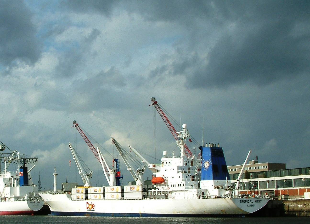 CA-Kühlschiff TROPICAL MIST IMO Number: 8408868 MMSI Number: 311089000 Callsign: C6FS2 Length: 149 m Beam: 22 m